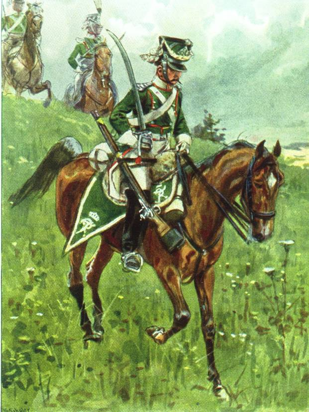 Württembergisches Dragoner-Regiment „Kronprinz“ 1809